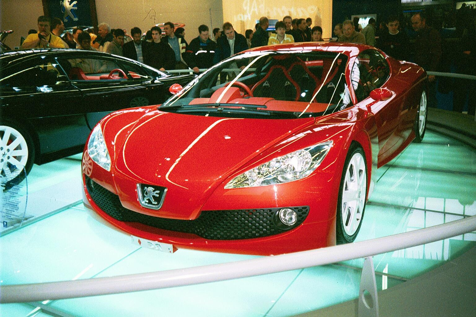 Peugeot RC